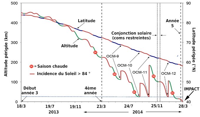 Evolution de l'orbite de MESSENGER durant la dernière phase de la mission